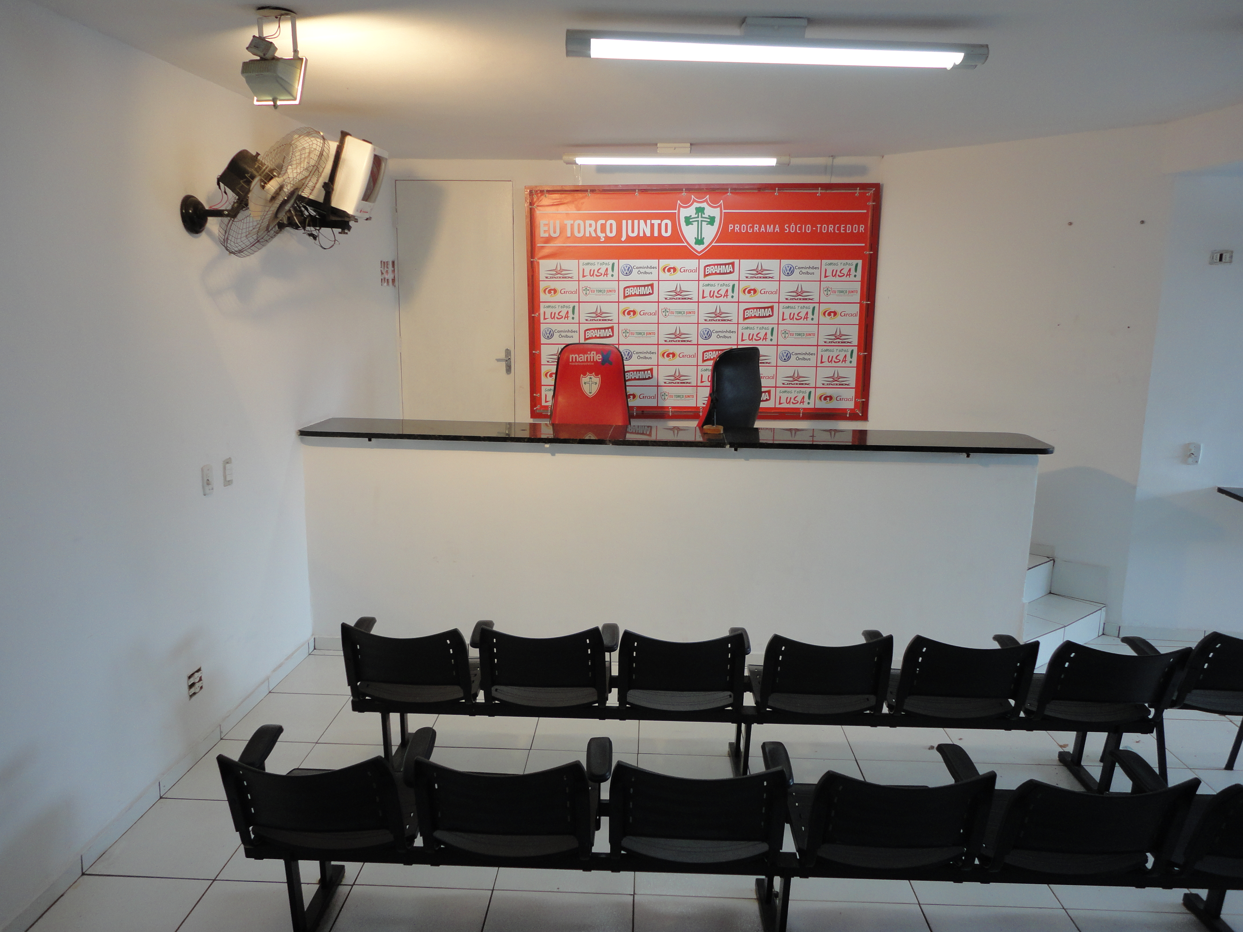 Sala de imprensa do Canindé, em São Paulo, Brasil